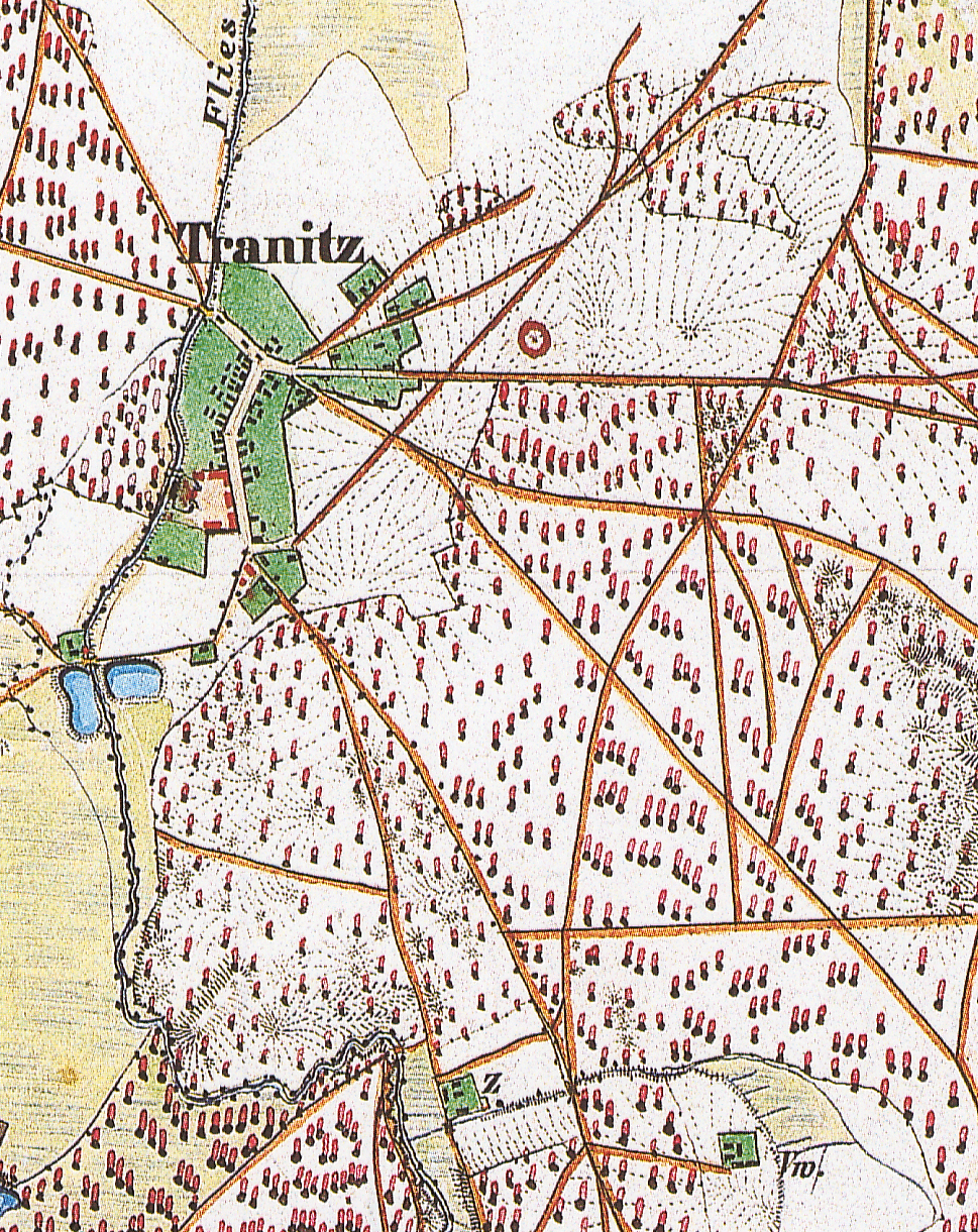 Tranitz, devastiert 1984, Gemarkung Dissenchen, Stadt Cottbus, Brandenburg, Ausschnitt aus dem Urmesstischblatt 4242 Cottbus-Ost von 1845